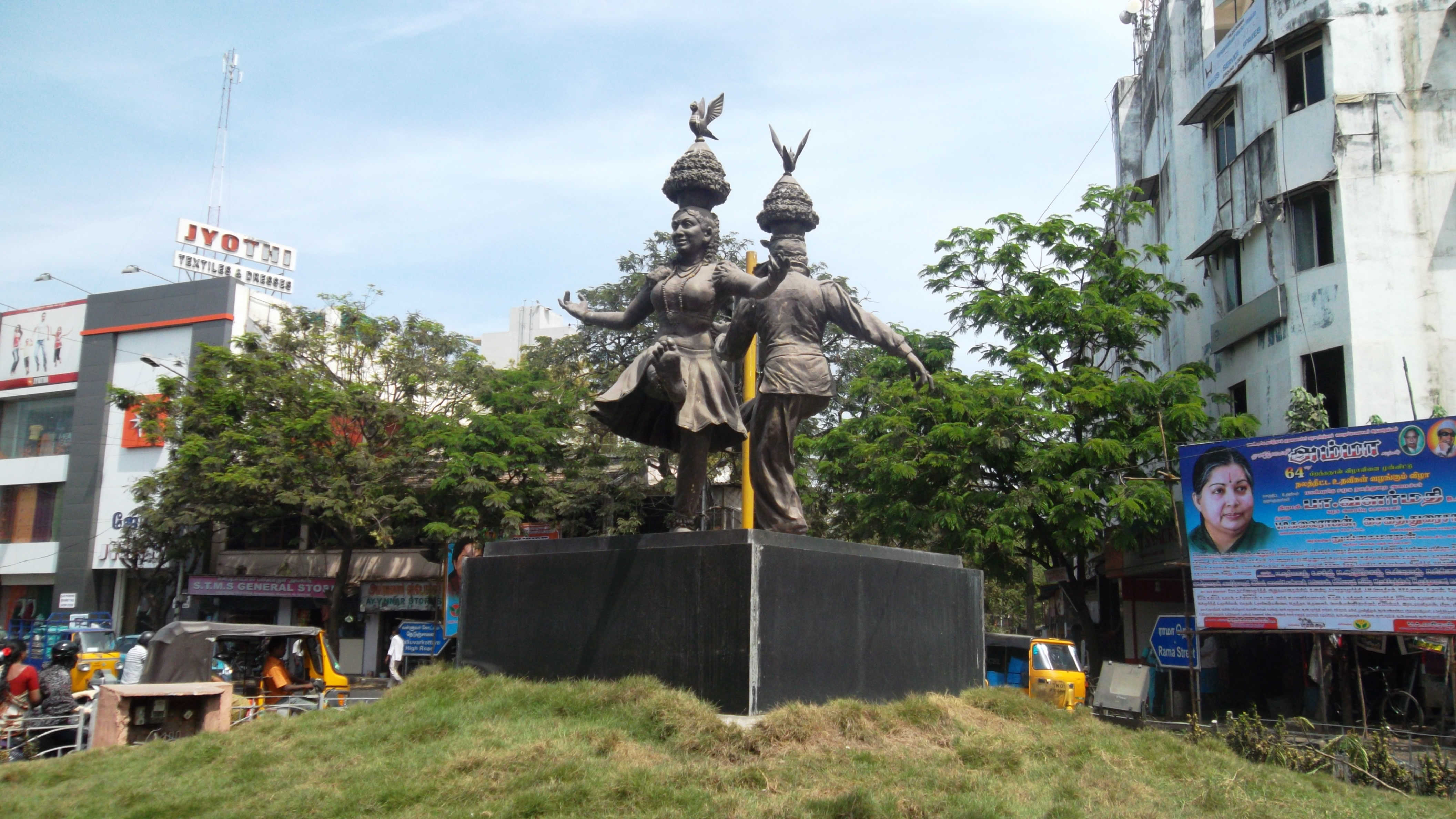 கரகாட்ட கலைஞர்கள் சிலை நுங்கம்பாக்கம் வள்ளுவர்கோட்டம் அருகில்